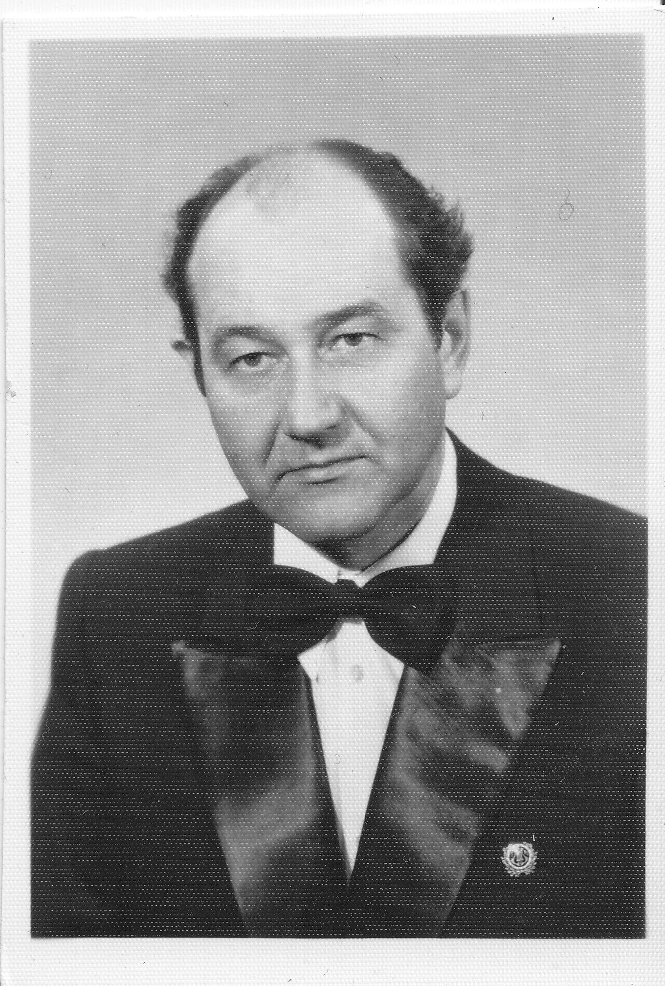 Olev Saks, Tartu Ülikooli kauaaegne teadlane ja õppejõud; Tartu Akadeemilise Meeskoori pikaajaline laulja ja solist.